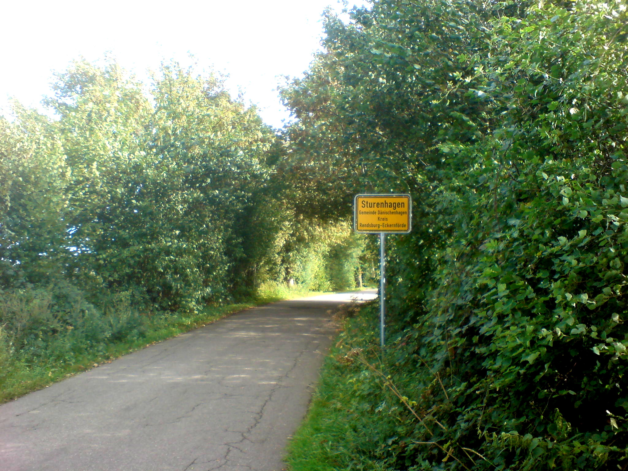 Allee und Knicks mit Ortsschild Sturenhagen